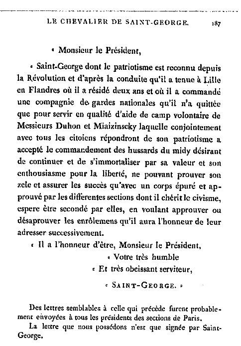 Version imprimée d'un exemplaire de la lettre signée par Saint-George, informant qu'il prend le commandement des hussards du midy.